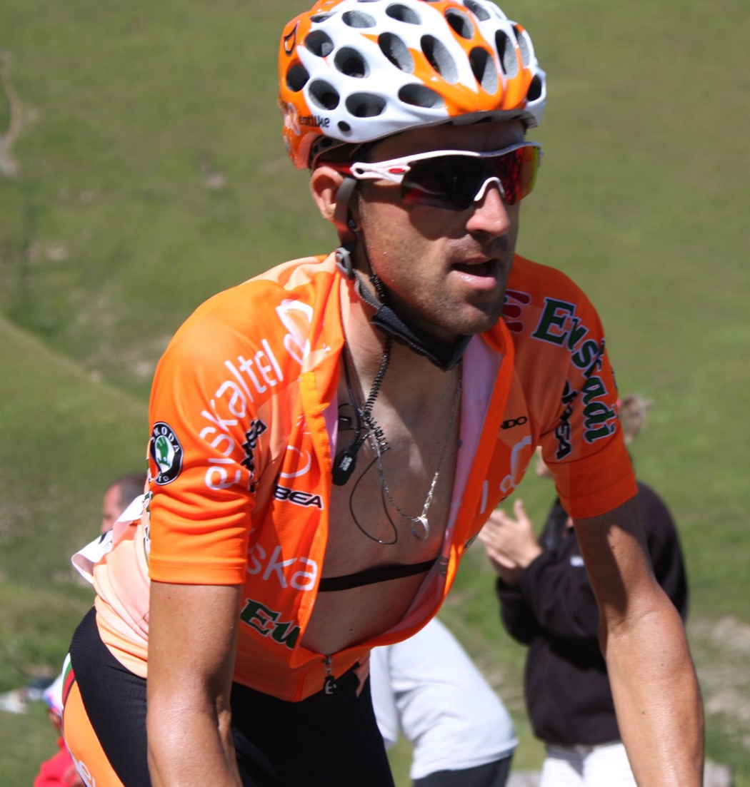 7699 zubeldia